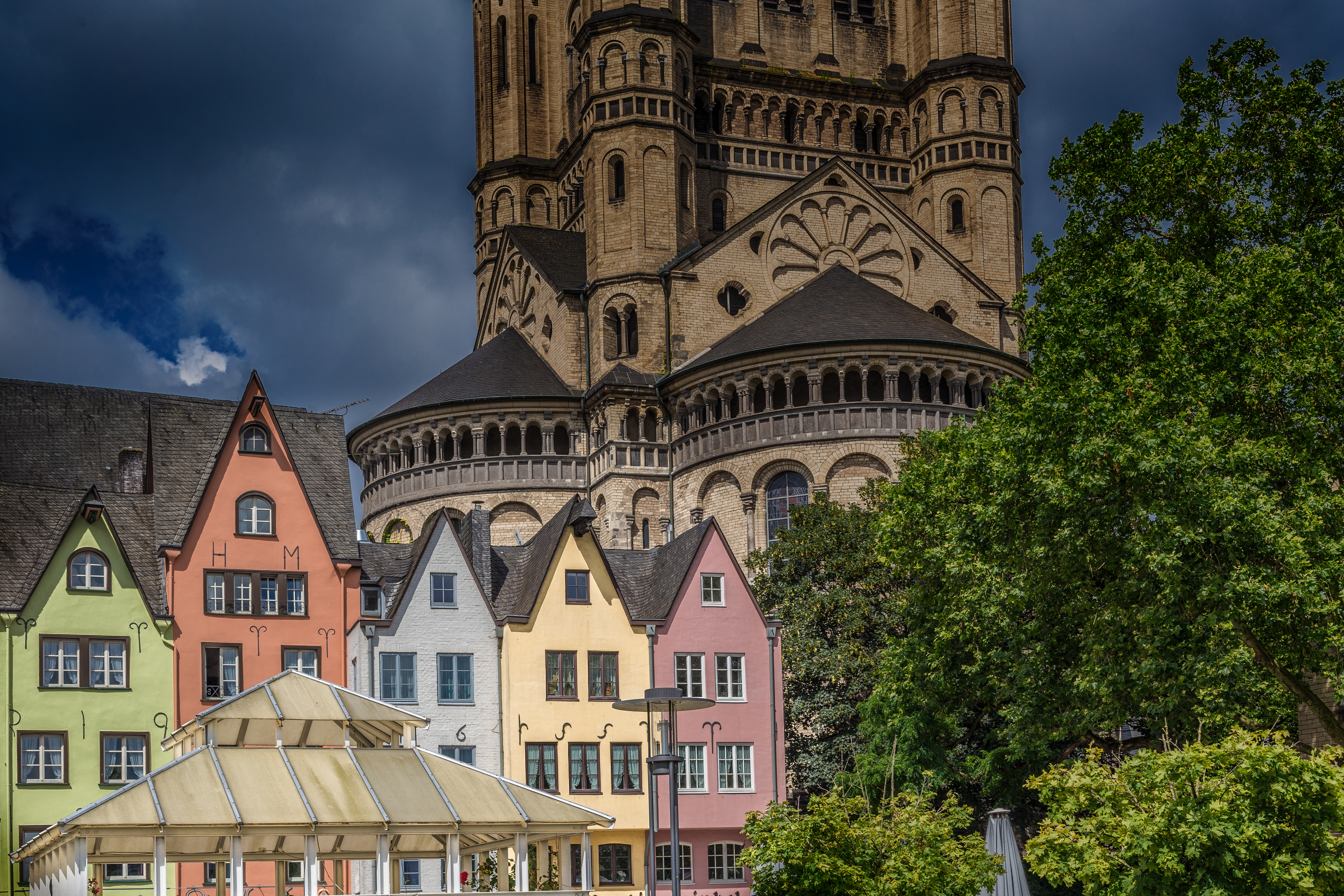 Die bunten Häuser stehen in der Altstadt von Köln am Fischmarkt, einem Teil der berühmten Rheinuferpromenade zwischen Kölner Dom, Hohenzollernbrücke, Museum Ludwig und Groß Sankt Martin.